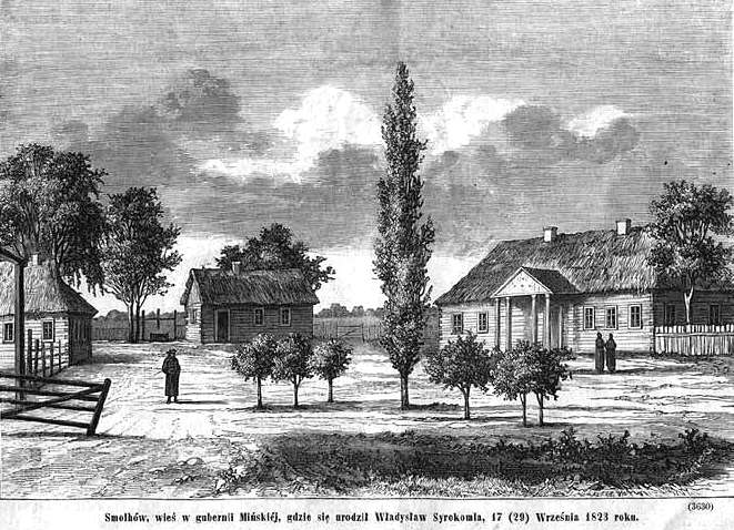 Smolgów (d. Smolhów), miejce urodzenia Władysława Syrokomli